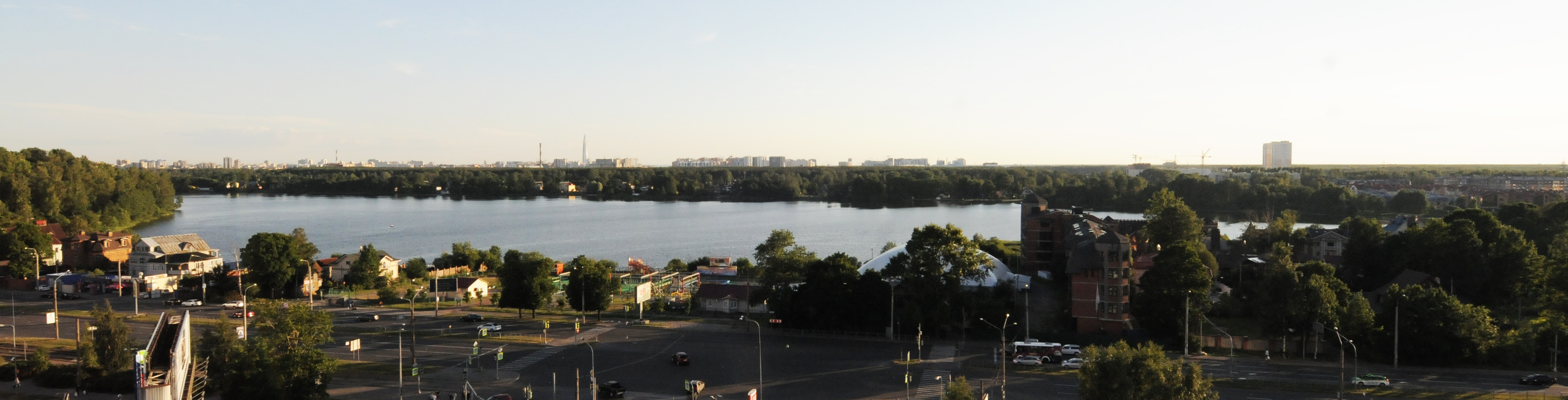 Нижнее озеро из группы Суздальских озёр